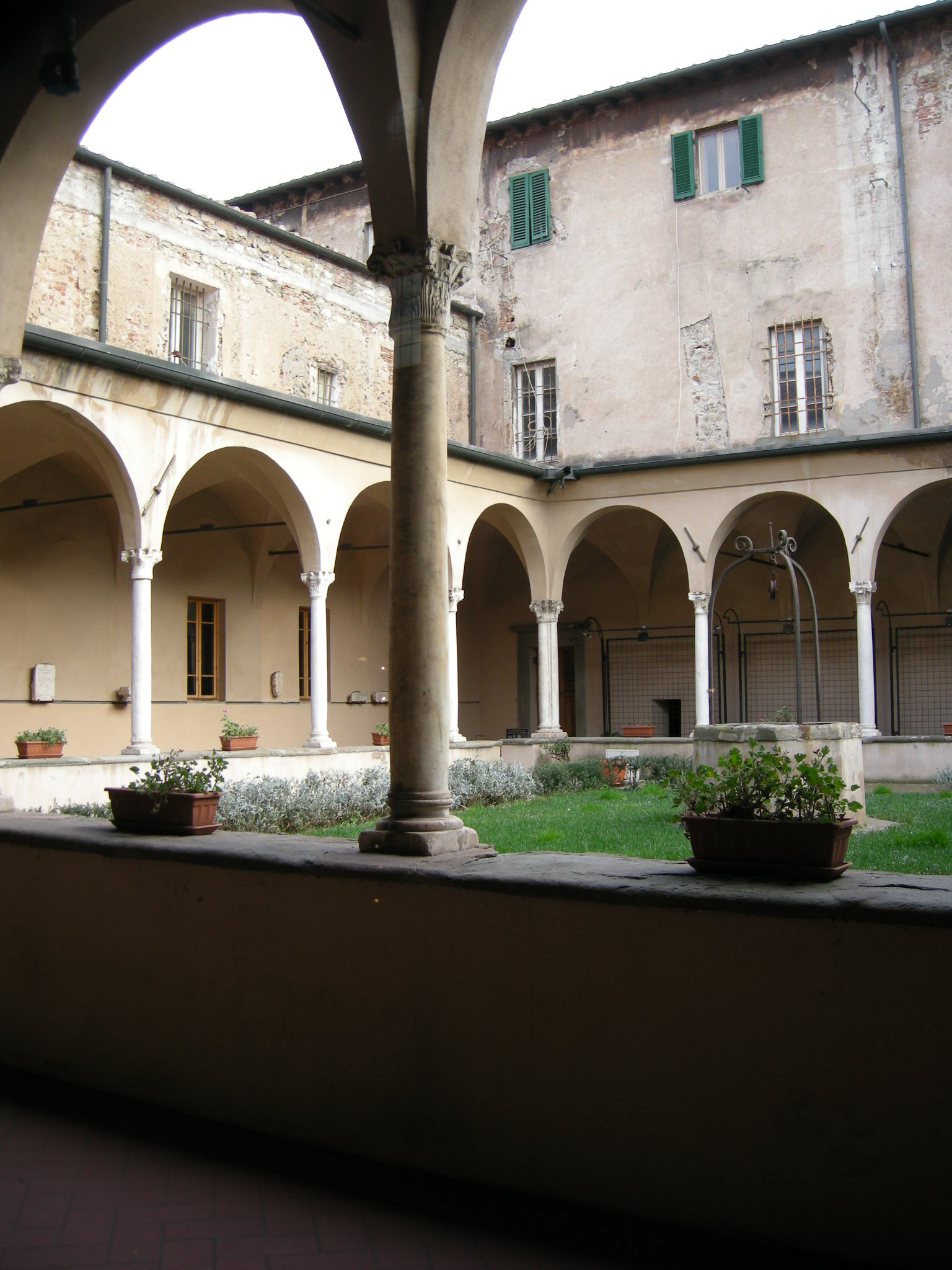 Sant'Antimo, chiostro